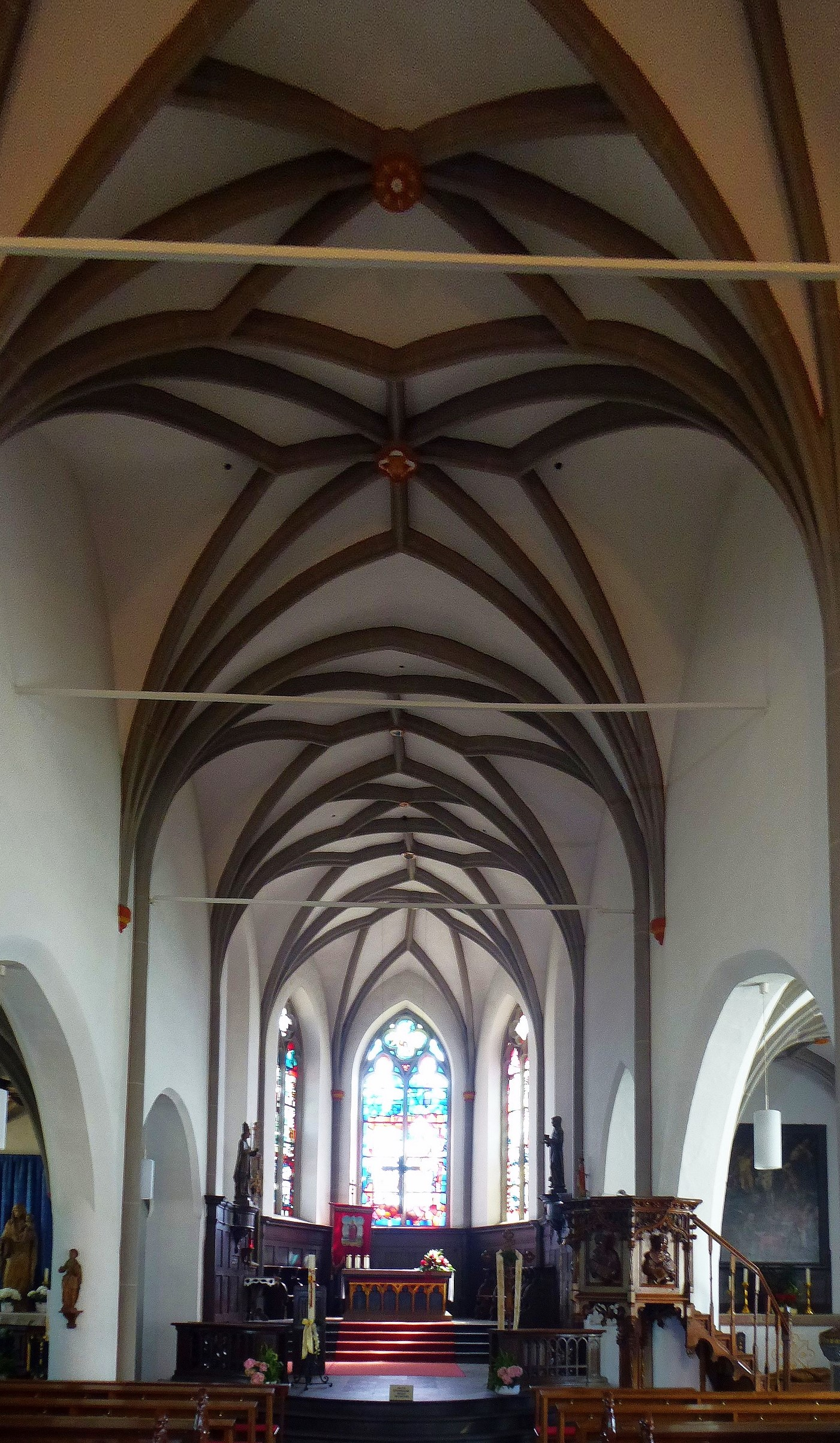 St. Matthias, Hellenthal-Reifferscheid